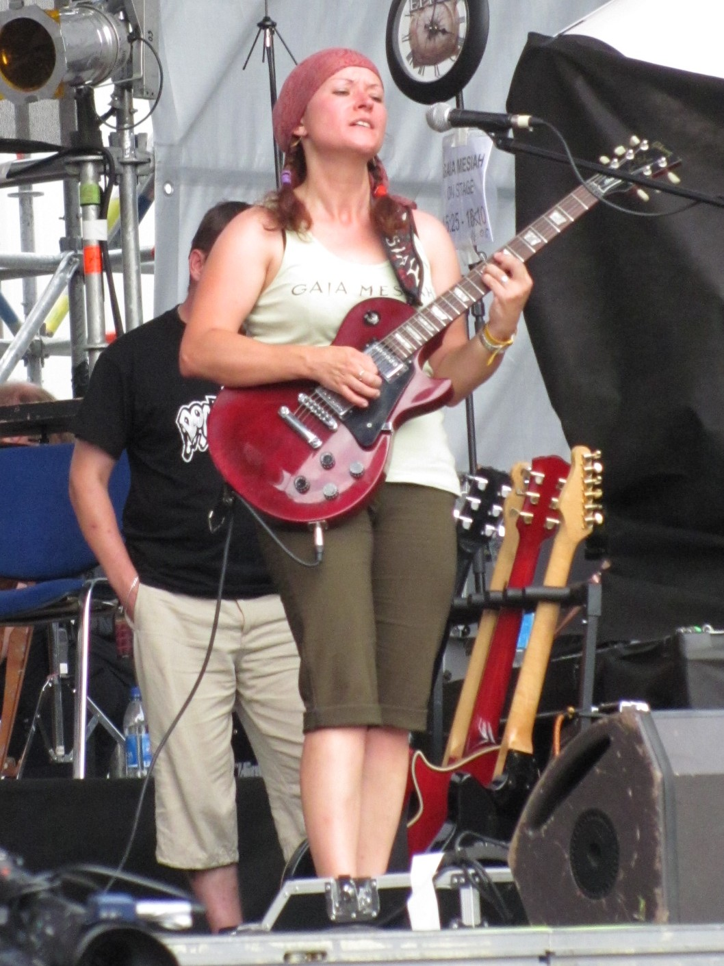 Santa Morella, Gaia Mesiah, Ronnie James Dio stage, Masters of Rock 2010